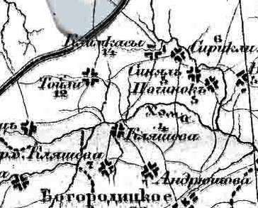 Село Климова (Климкасы) и ближайшие населённые пункты. «Специальная карта Европейской России»